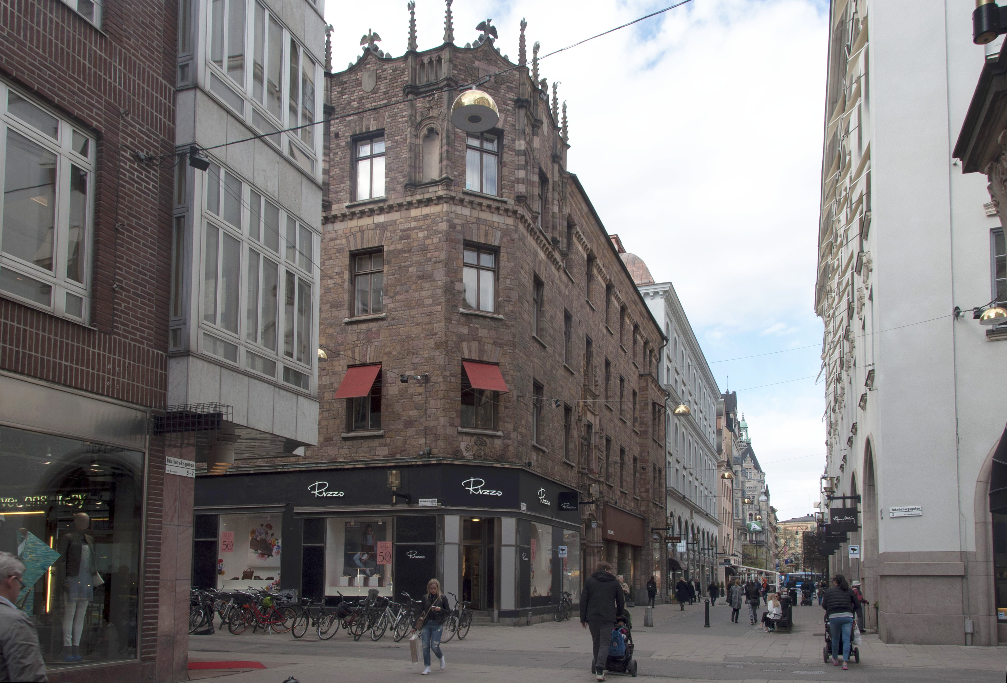 Vildmannen 7, Biblioteksgatan 9, Jakobsbergsgatan 6, Nybyggnadsår 1895 - 1897 Burman & Co (Byggherre) Carl Gustaf Ohlsson (Byggmästare) Erik Josephson (Arkitekt) - Fasader Gottfried Karlsson (Arkitekt) - Planer